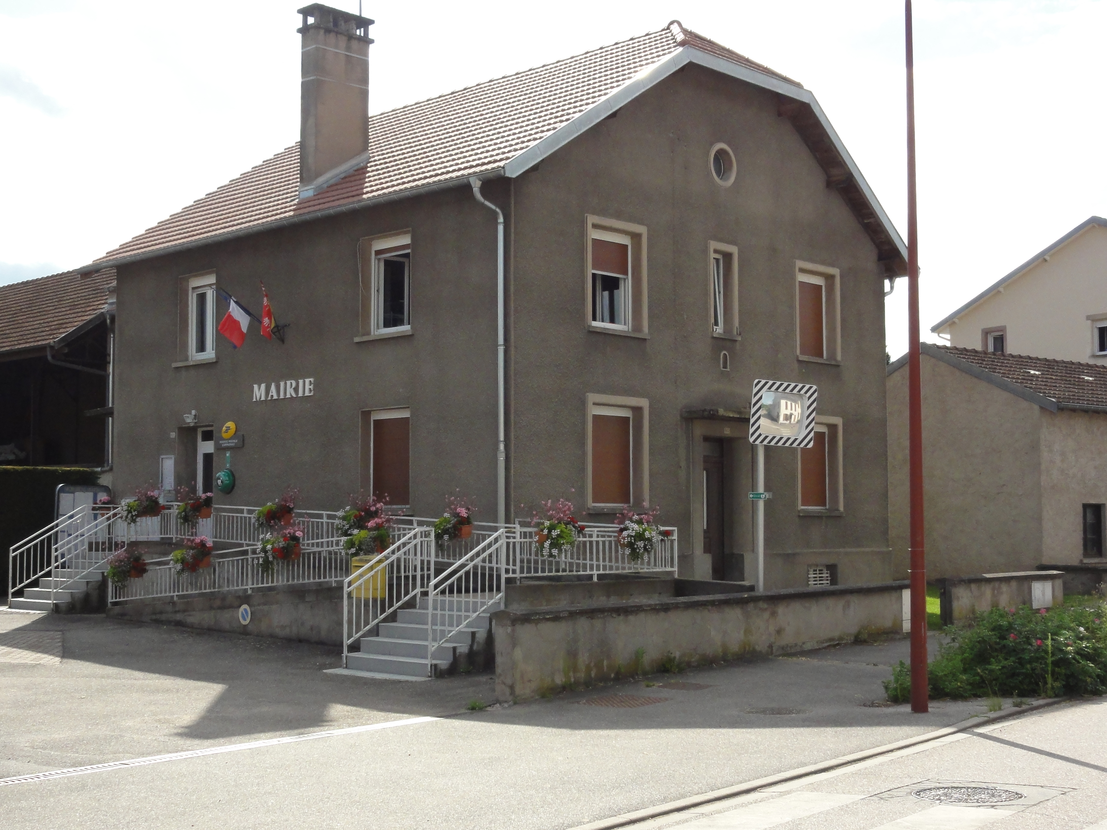 Benaménil (M-et-M) mairie